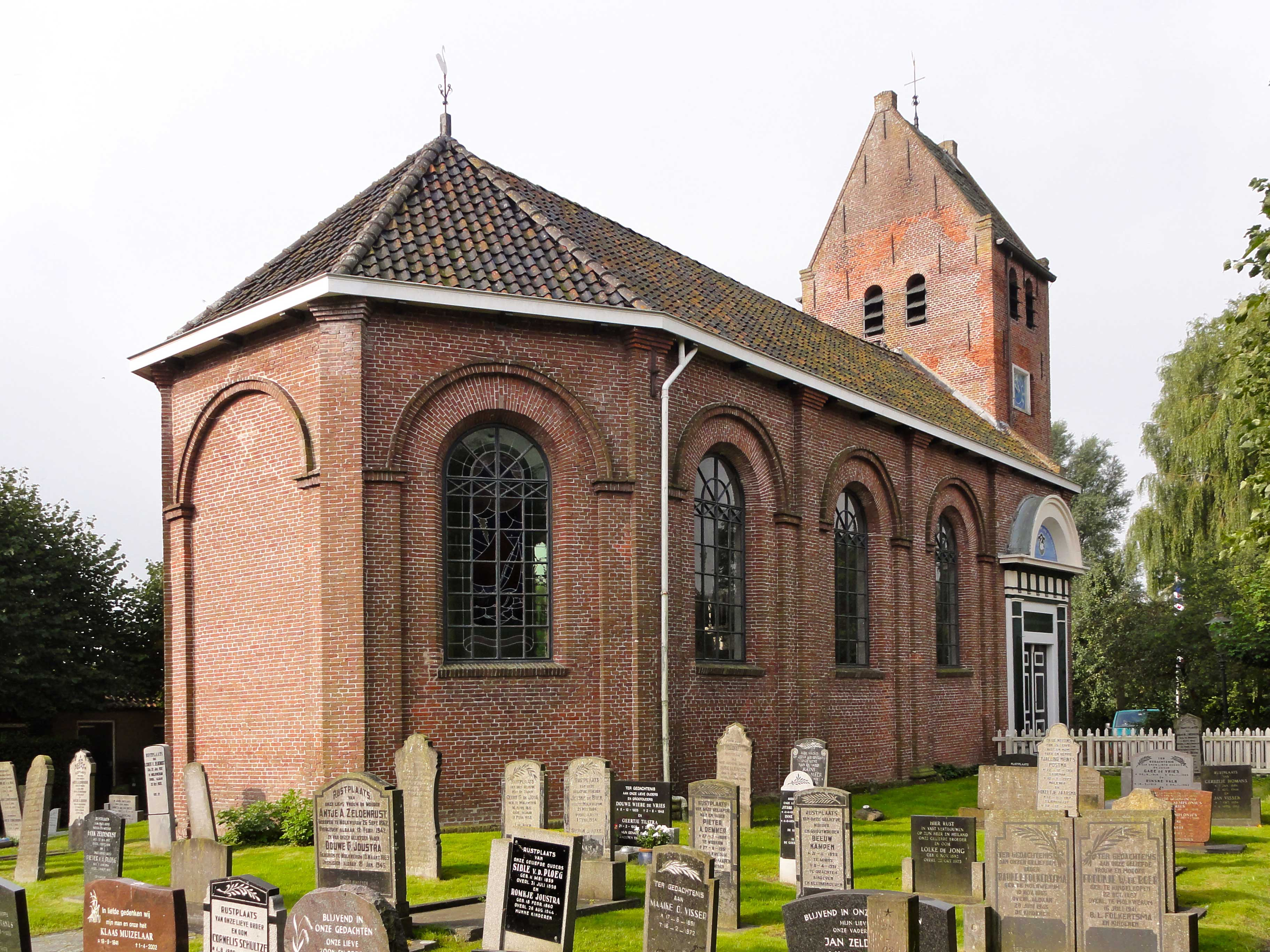 Sint-Lebuïnuskerk van Molkwerum